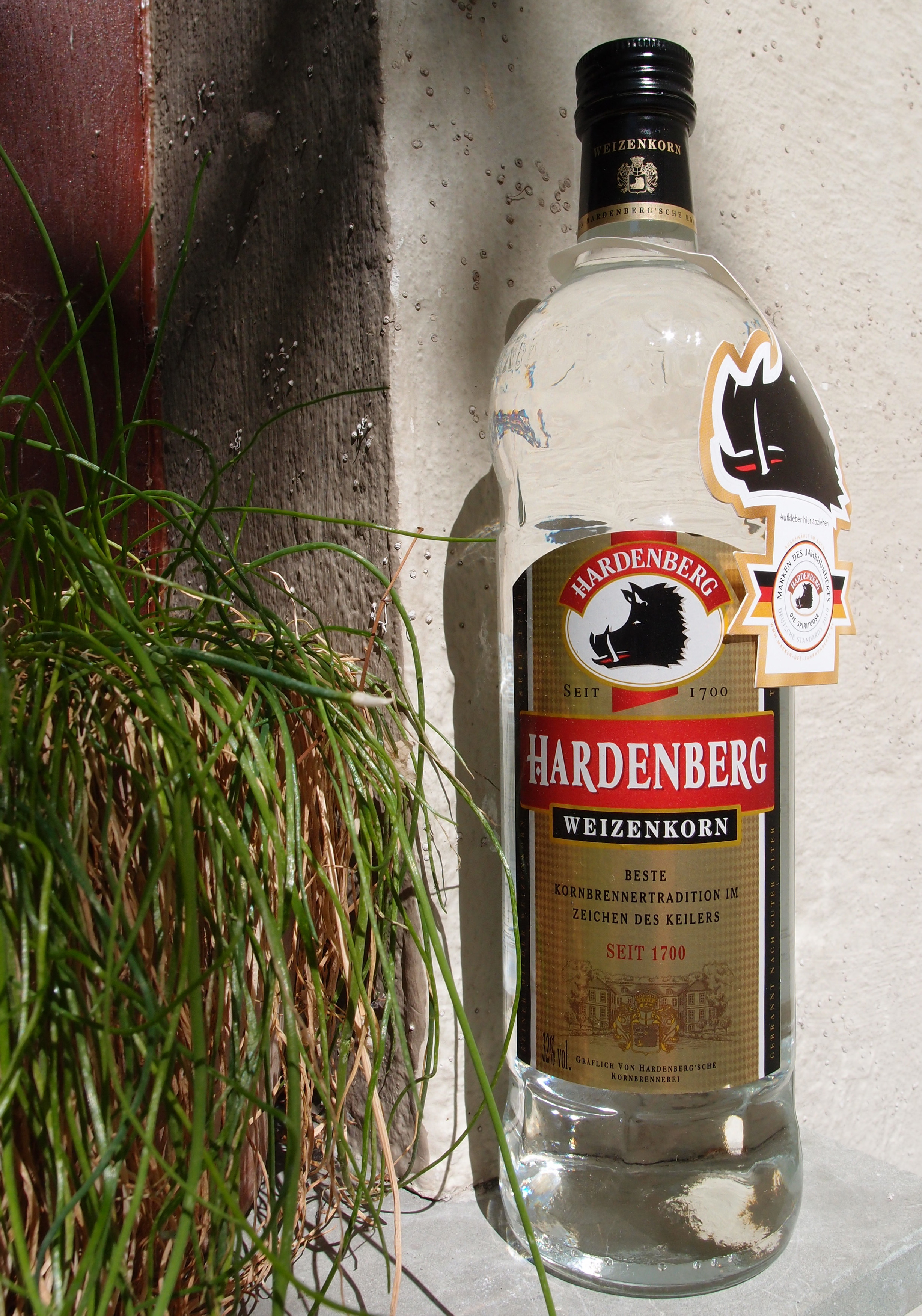 Hardenberg Weizenkorn Datum: 02.09.2011 Urheber: M. Pfeiffer alias Benutzer:Gordito:1869 Quelle: privates Fotoarchiv des Urhebers